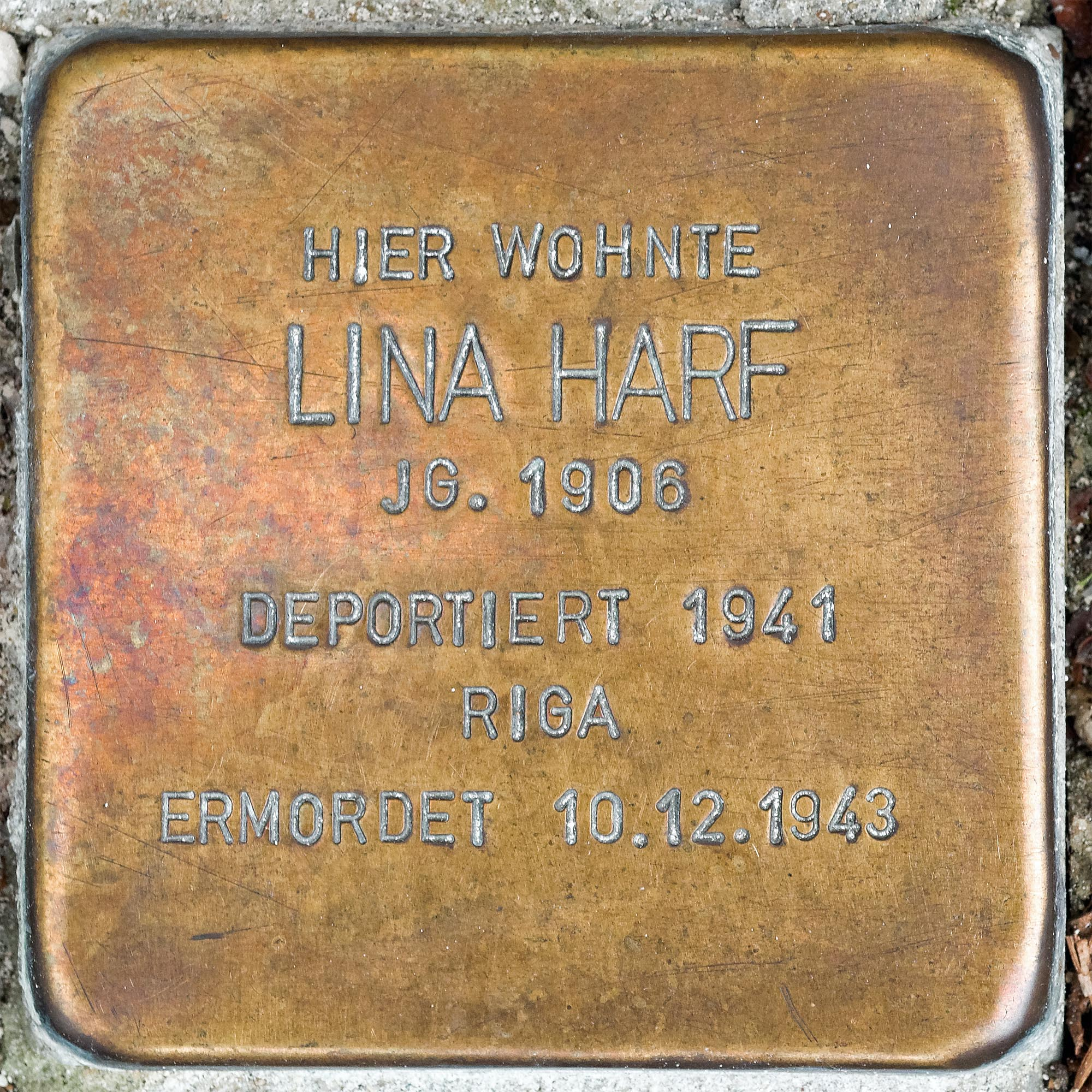 Stolperstein Harf, Lina